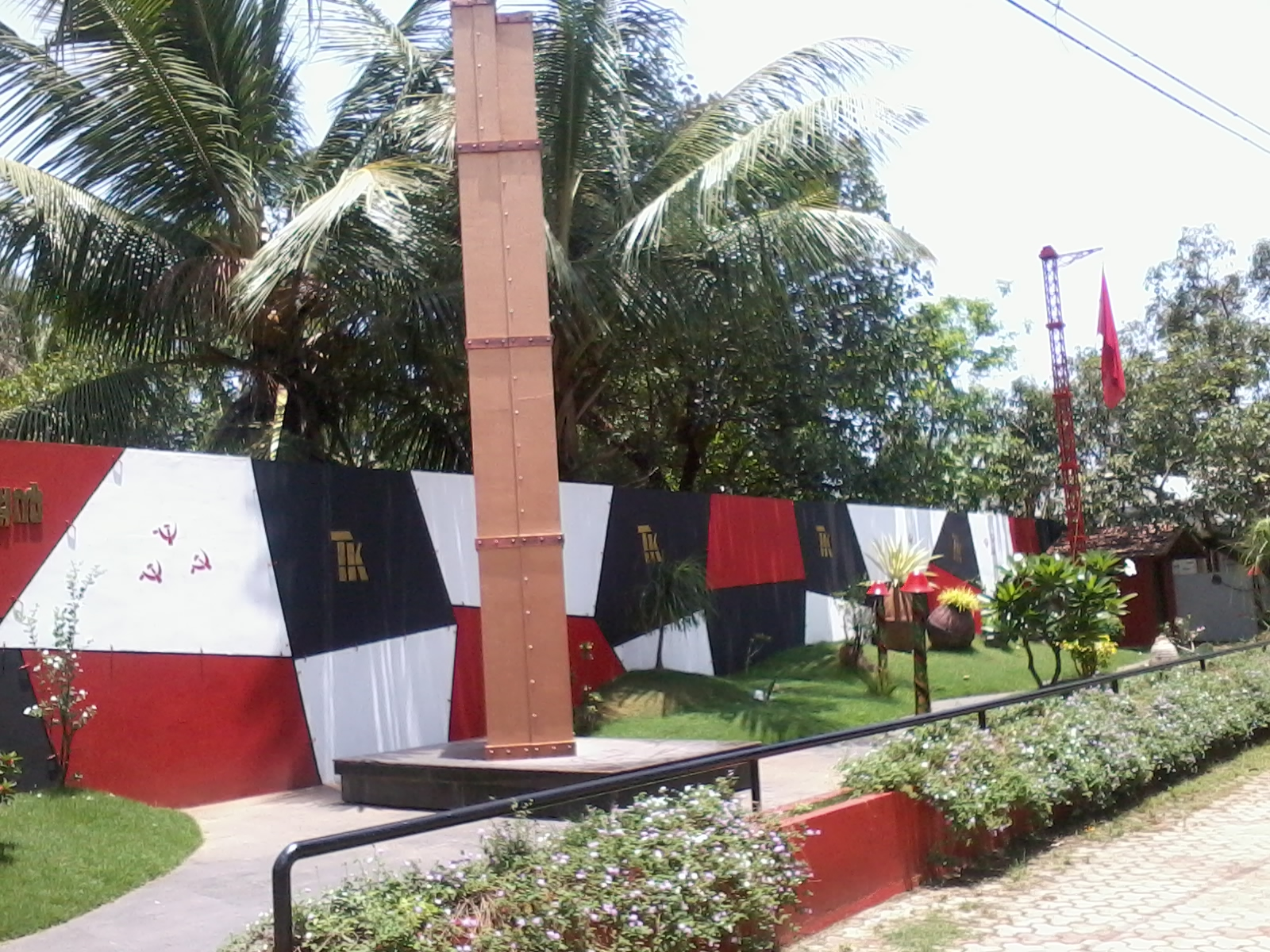 TK Smrithi mandapam